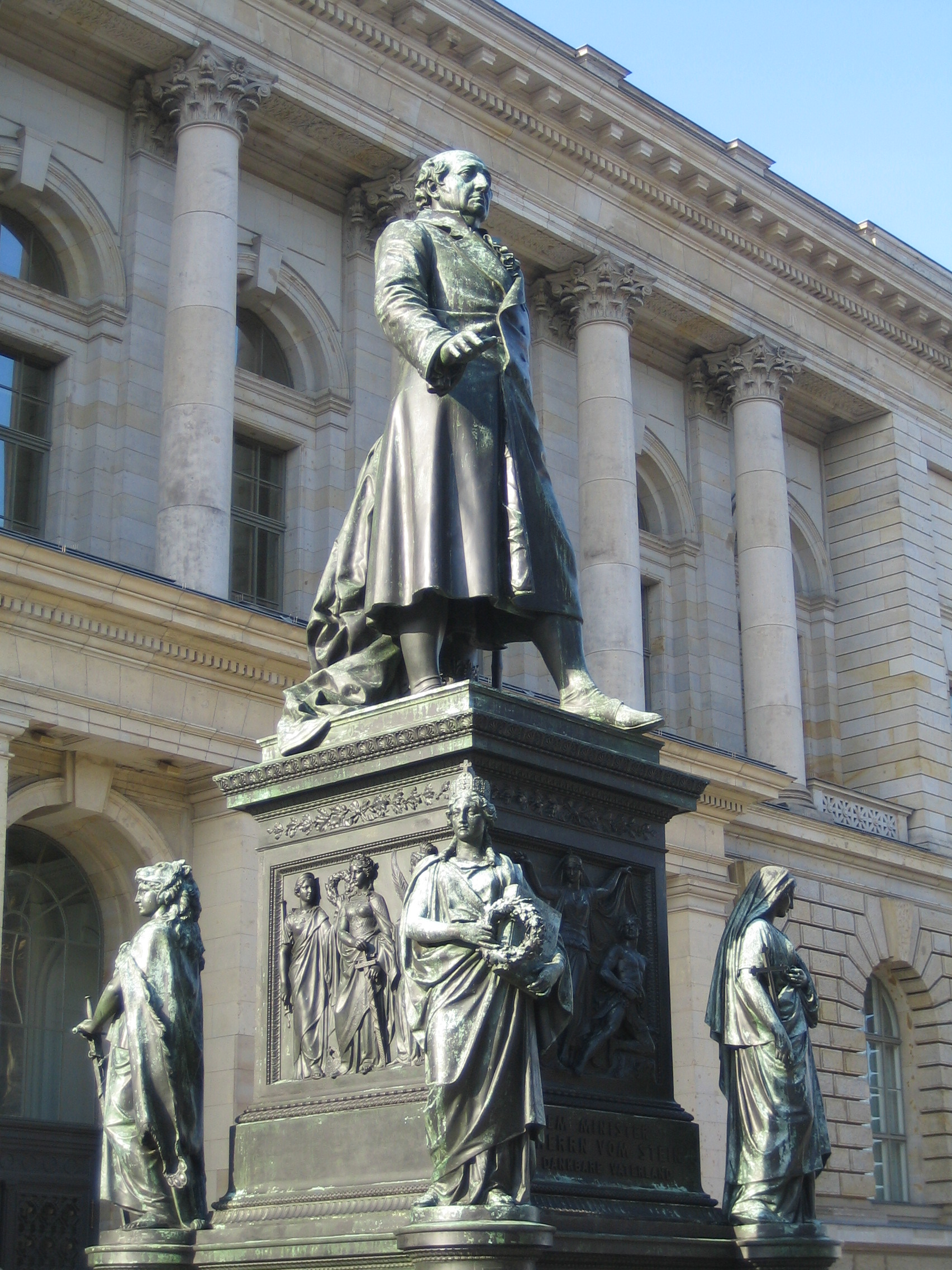 Denkmal für den preußischen Minister Freiherr vom und zum Stein, entstanden 1867. Teilansicht. Bildhauer: Hermann Schievelbein. Heutiger Standort: Berlin-Mitte, Niederkirchnerstraße, vor dem Berliner Abgeordnetenhaus. Ursprünglicher Standort: Dönhoffplatz/Leipziger Straße.